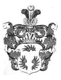 Wappen Lüttwitz 2 - Tyroff AT.jpg